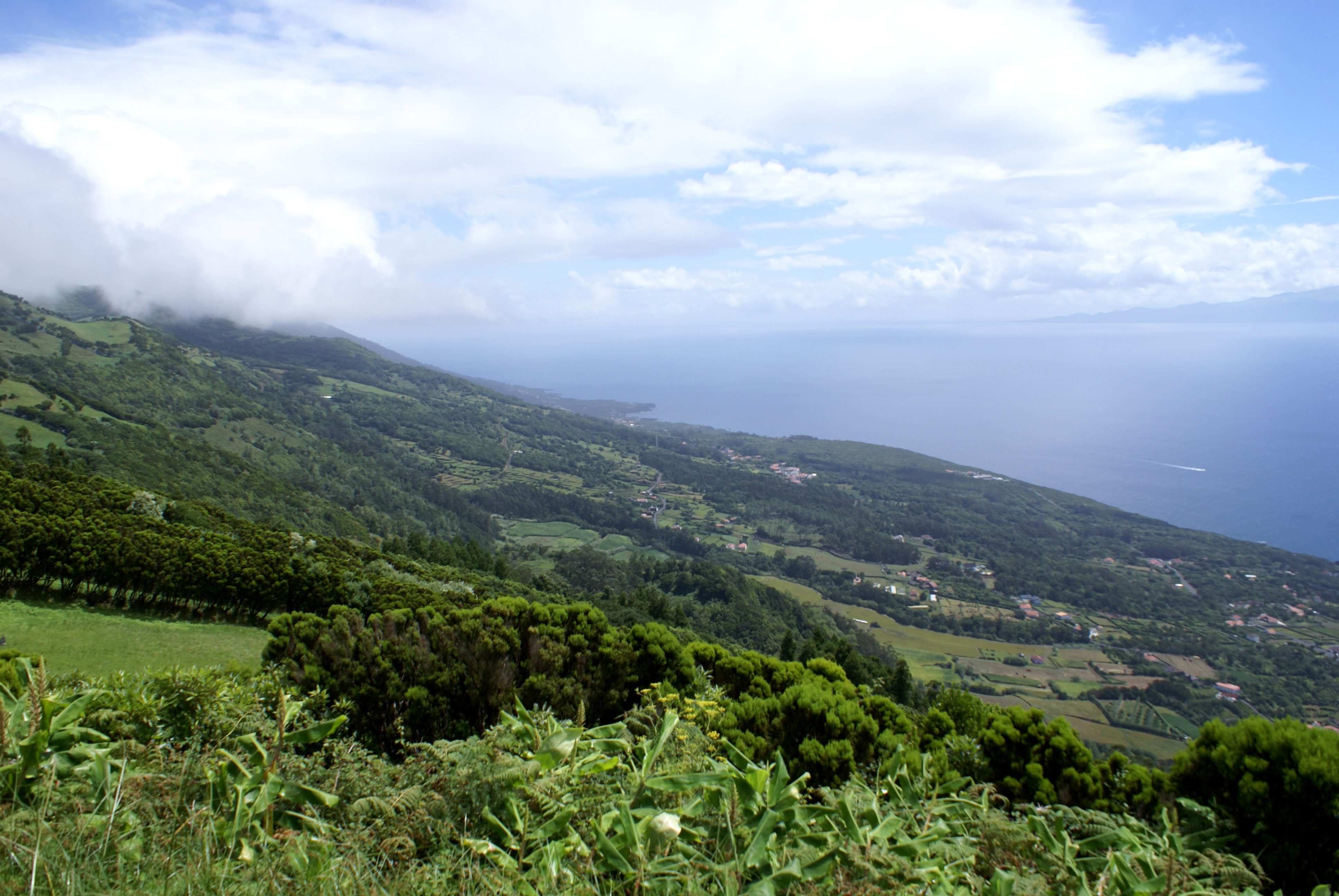 Parque do Terreiro da Macela, vistas de terra e mar, Velas, ilha de São Jorge, Açores